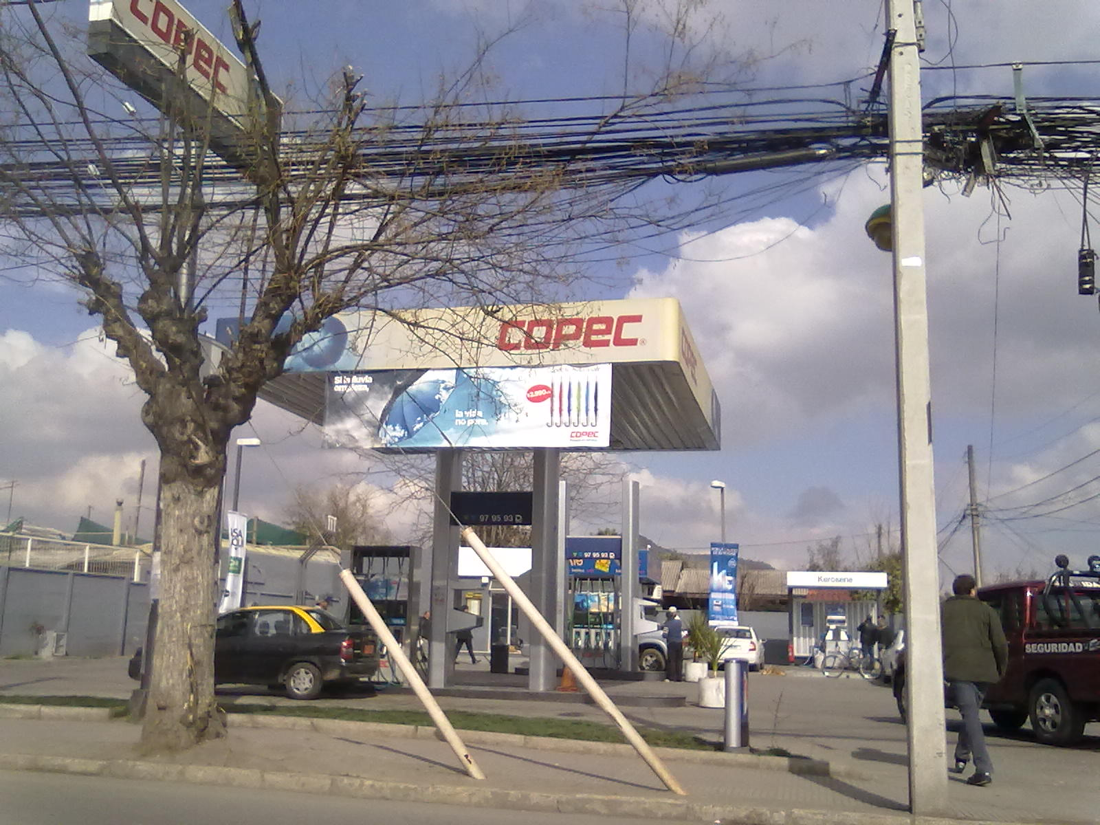 copec